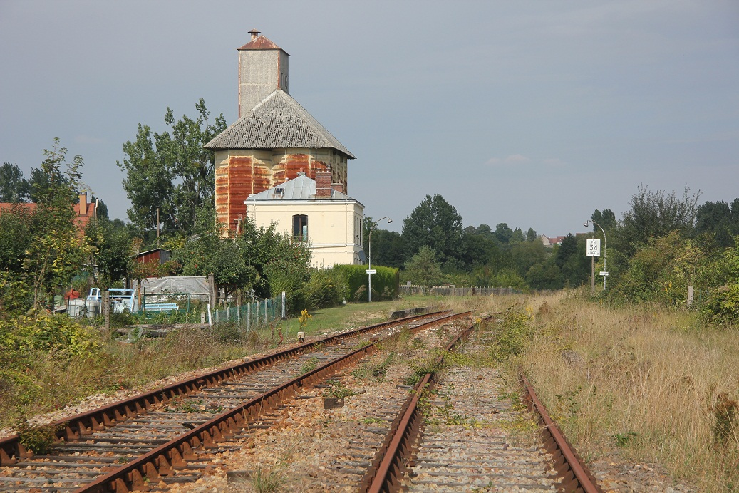 La gare de Neufmarché désormais désaffectée envahie par la végétation, Neuf-Marché, Seine-Maritime, France.